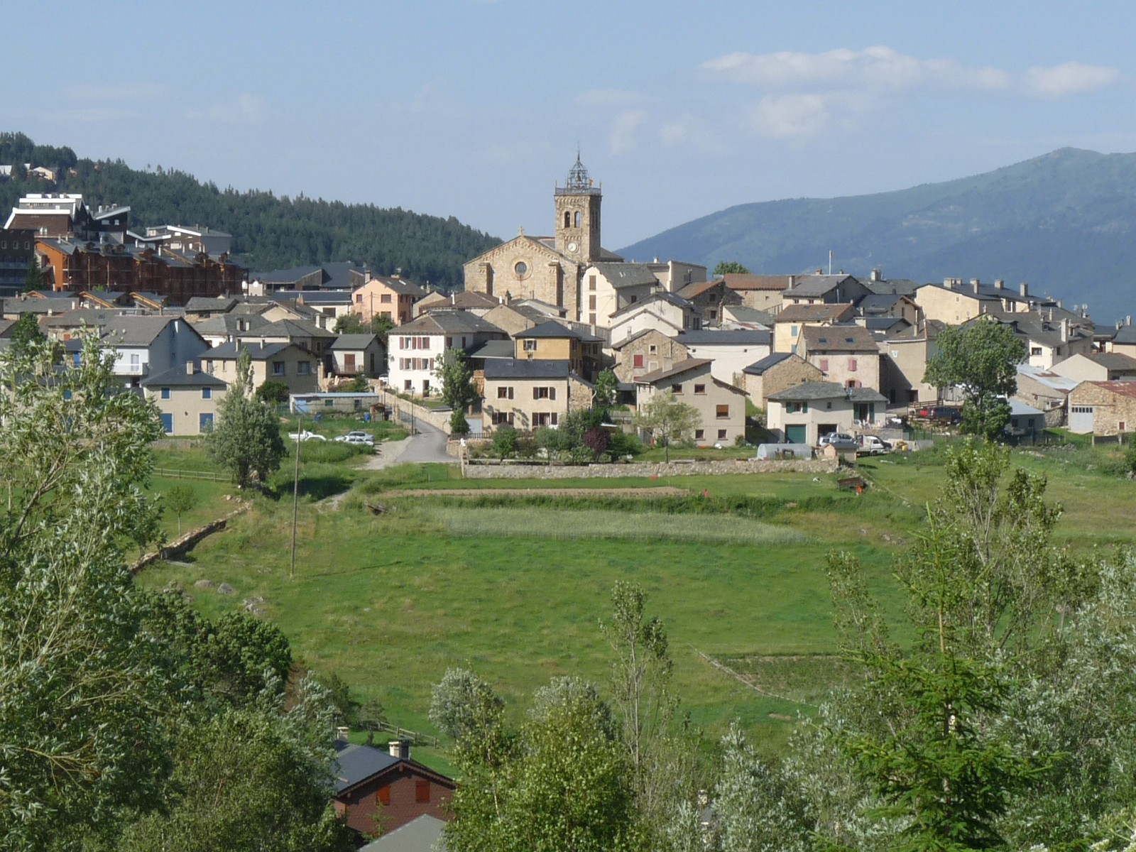 Les Angles, Pyrénées-Orientales, France